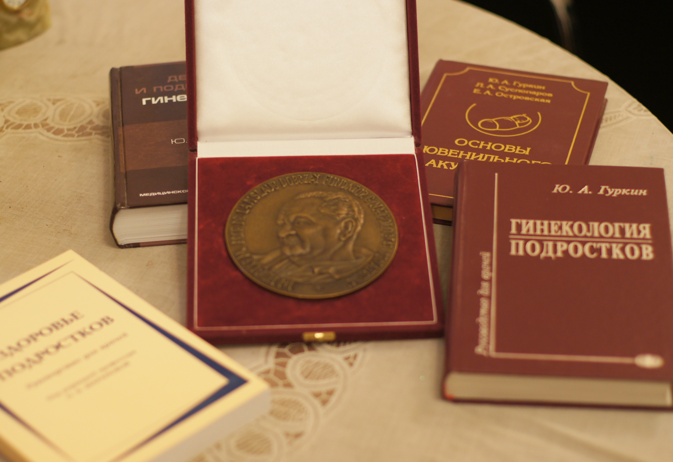 Некоторые книги профессора Юрий Александрович Гуркин